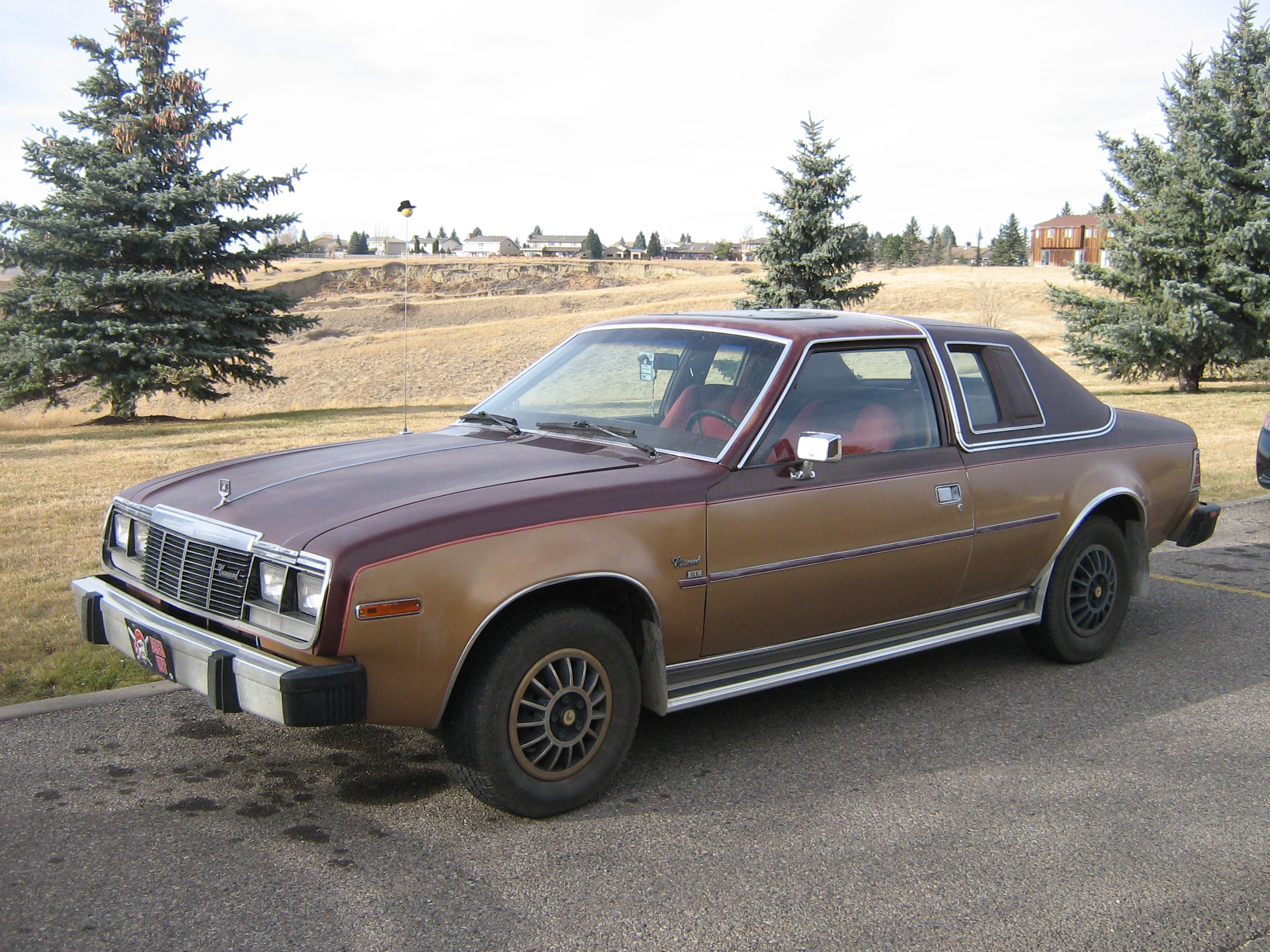 AMC Concorde